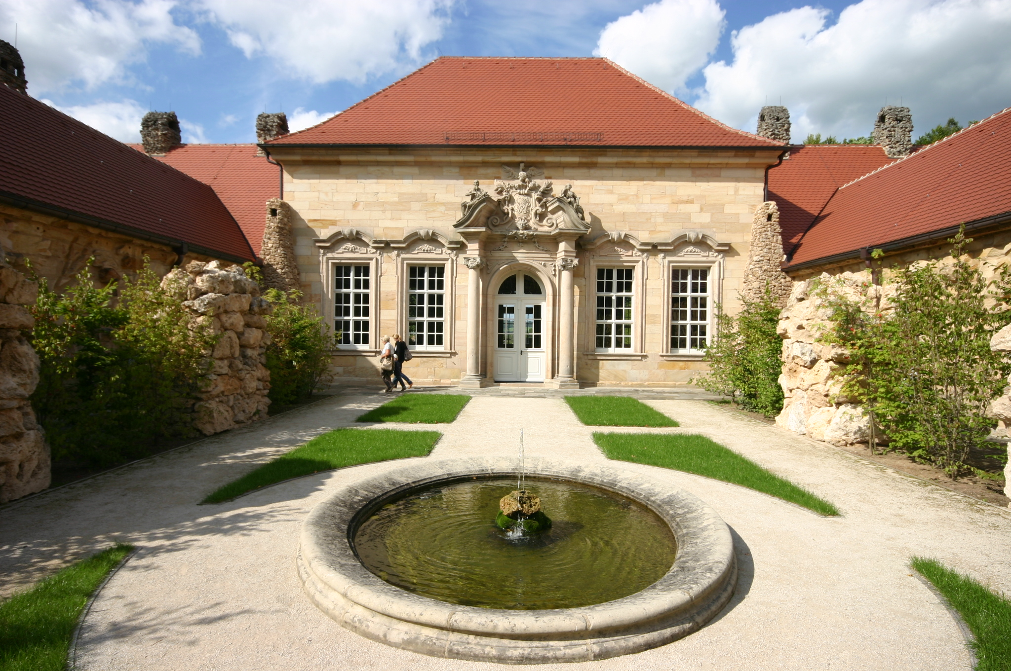 Eremitage, Altes Schloss, Blick von der Grotte über den abgeschiedenen Innenhof auf den Marmorsaal, Springbrunnen